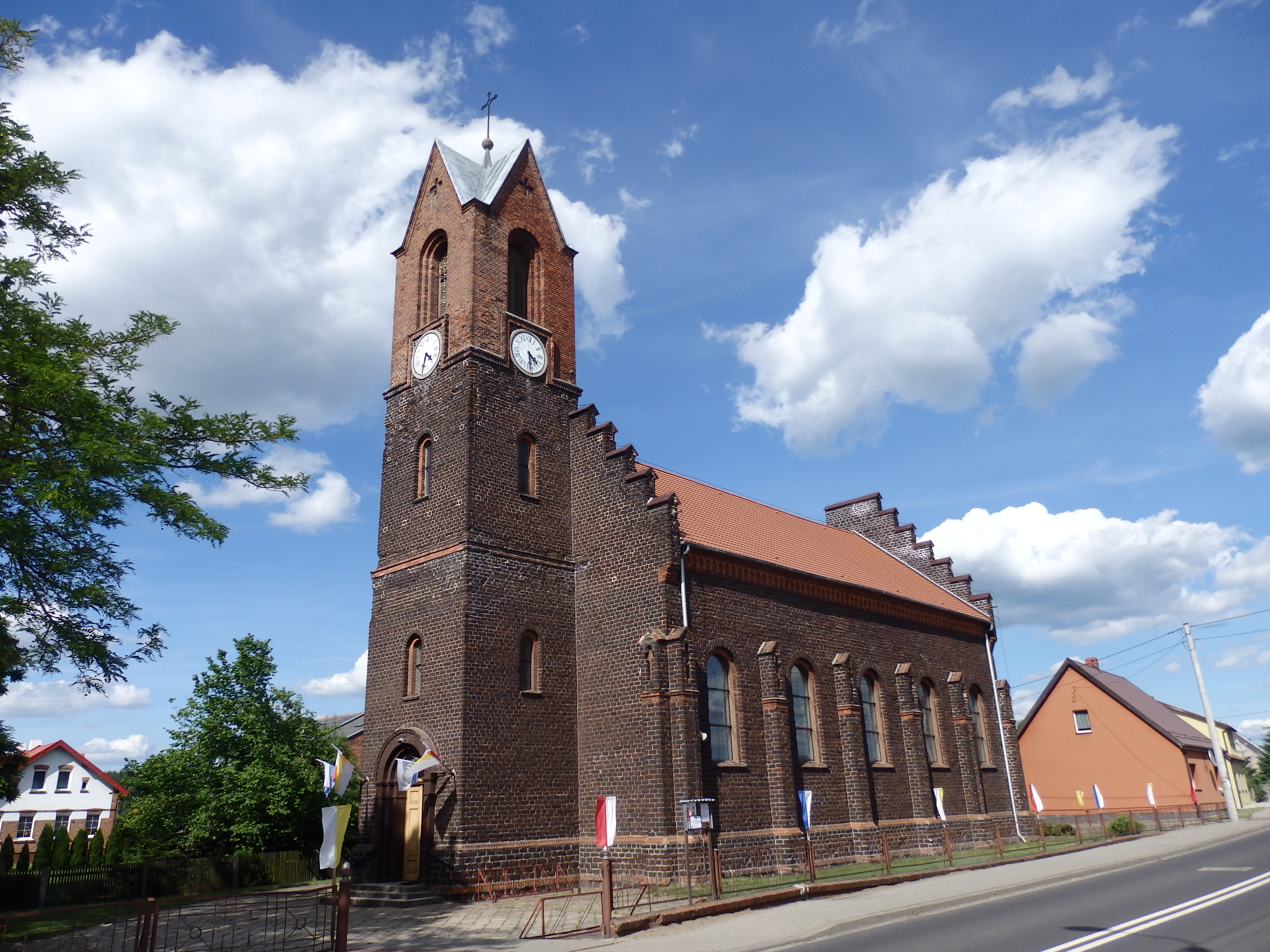 Kościół Najświętszej Marii Panny Niepokalanie Poczętej w Czarnymlesie.